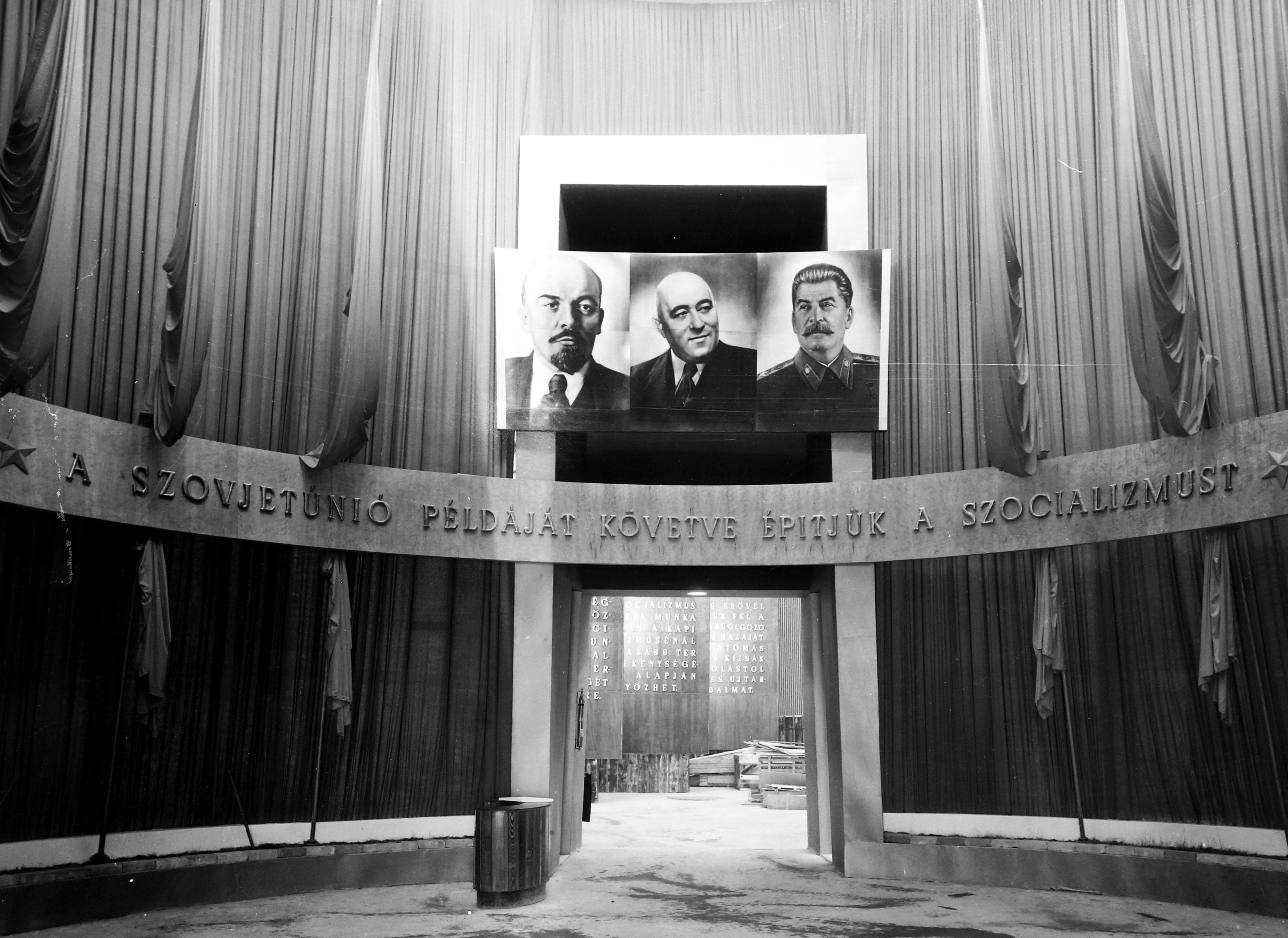 Budapest, Műcsarnok, Újítási és találmányi kiállítás